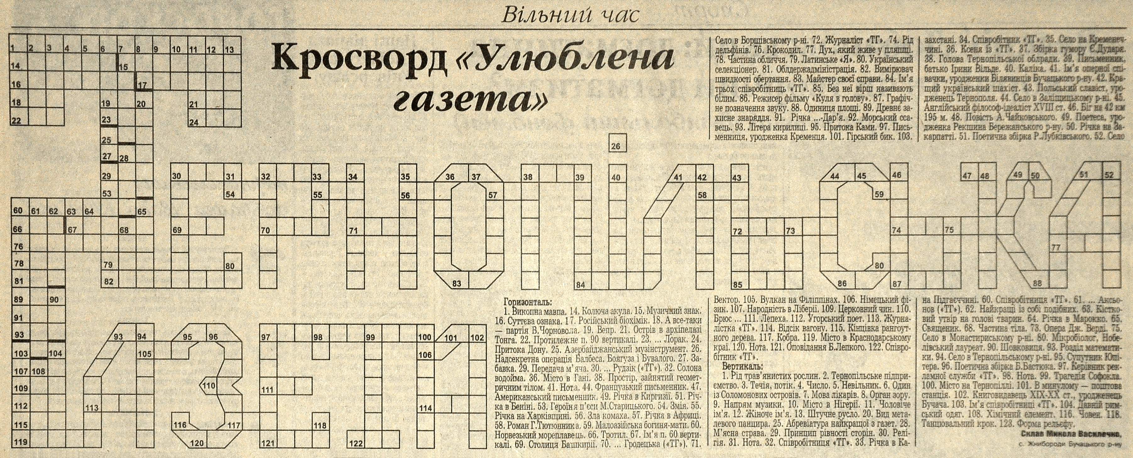 Класичний кросворд Миколи Василечка «Улюблена газета» надрукований у «Тернопільській газеті», № 22 від 27 травня 1999 року.